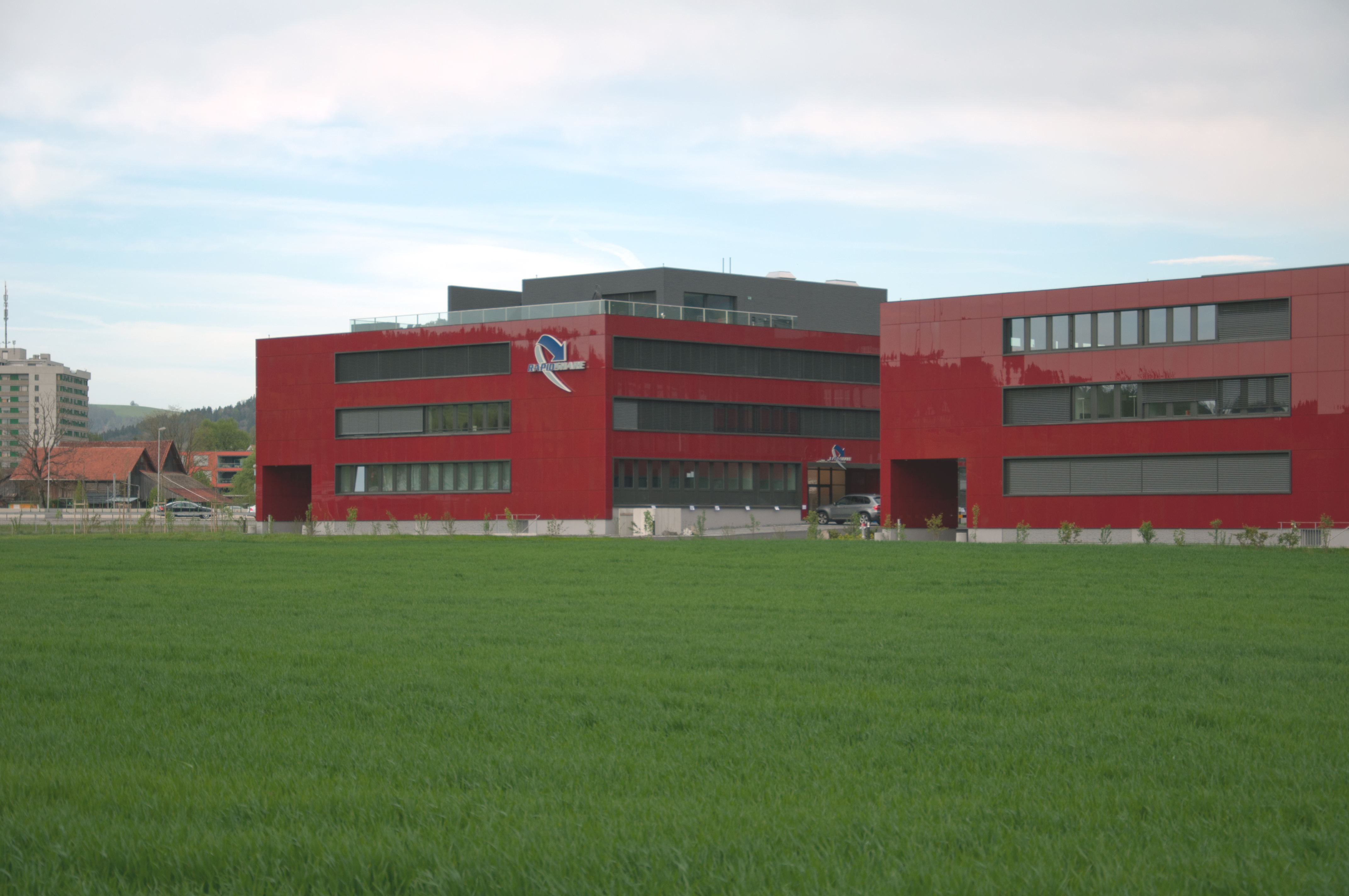 Rapidshare Hauptsitz in Baar ZG